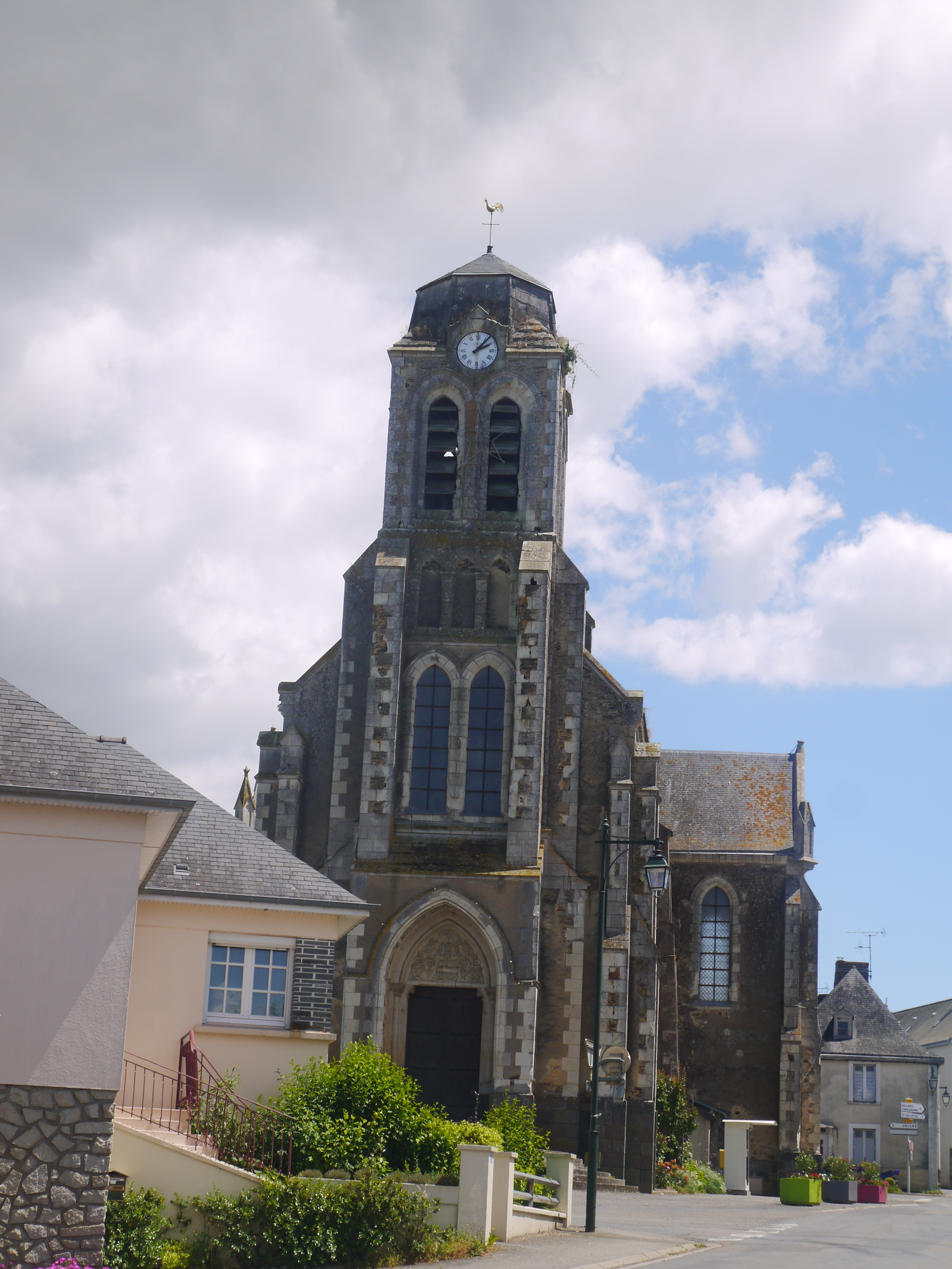 L'église Saint-Hilaire.